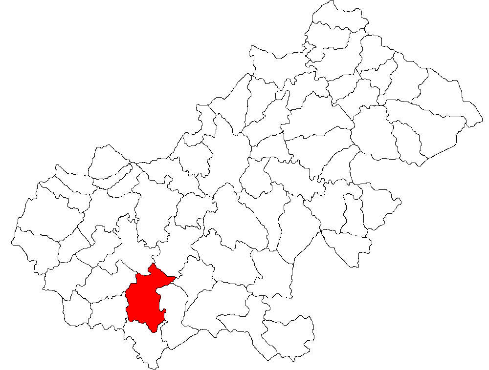 Categorie:Hărţi ale judeţului Satu Mare